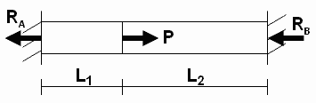 Hyperstatic unidimensional problem